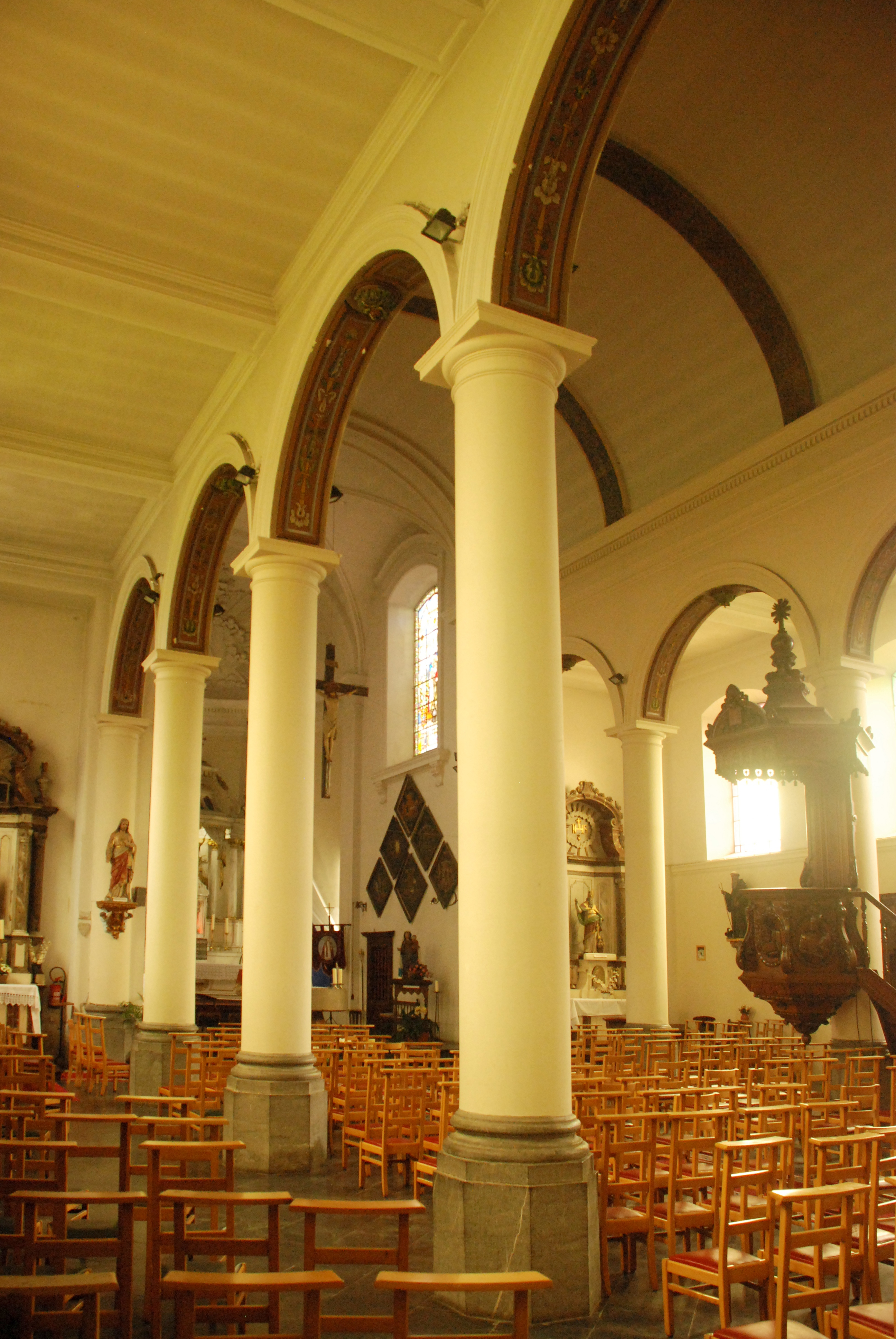 Belgique - Église Saint-Barthélémy de Bousval